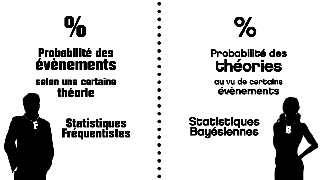 C'est le même modèle probabiliste vu par l'autre bout de la lorgnette : au lieu d'avoir les modèles et d'en déduire les événements, on dispose des événements et on essaie d'en induire les modèles, ce qui est un cas plus courant, mais demande un peu plus de calcul.